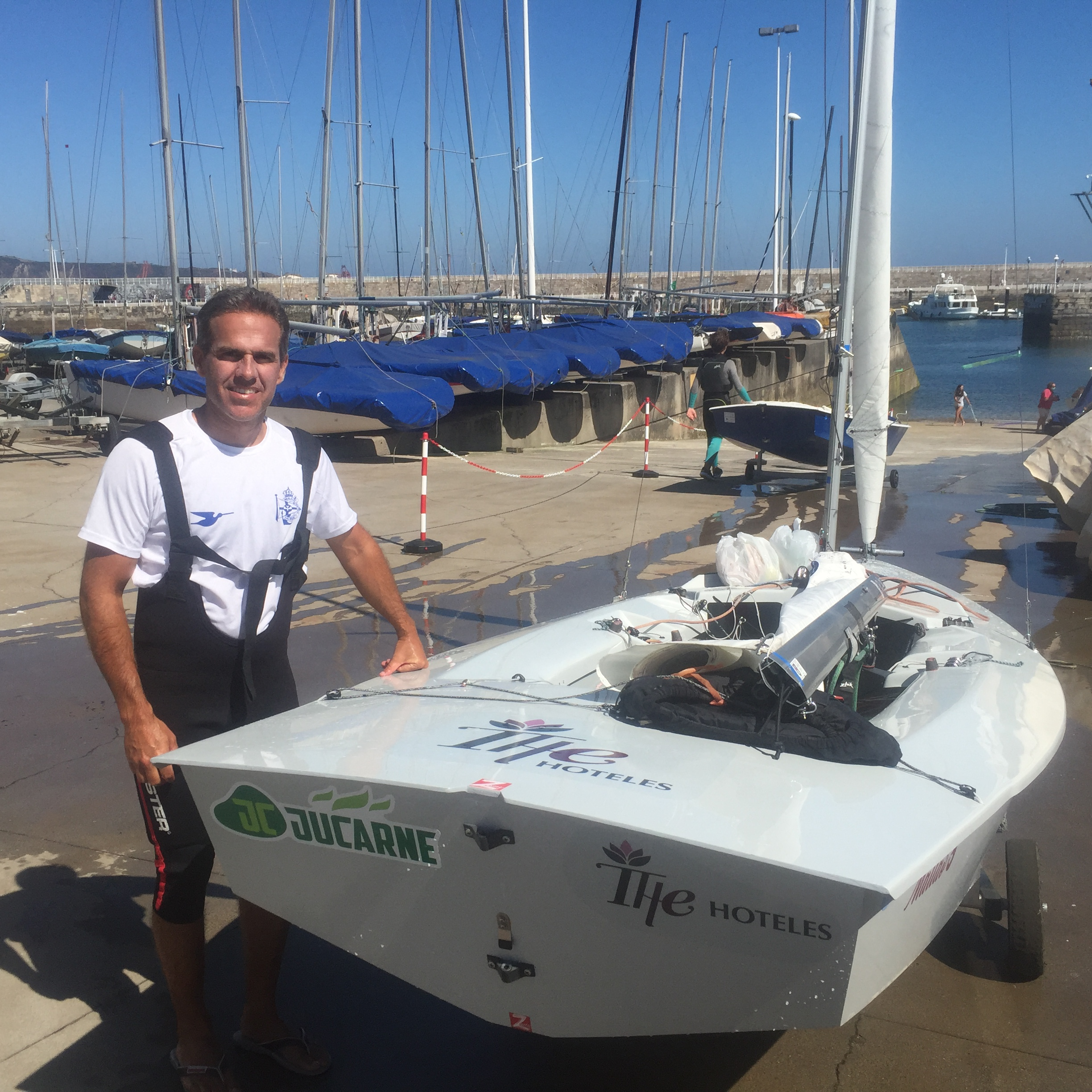 Gustavo del Castillo at the regatta "Memorial Carlos del Castillo" in Gijón (Spain)